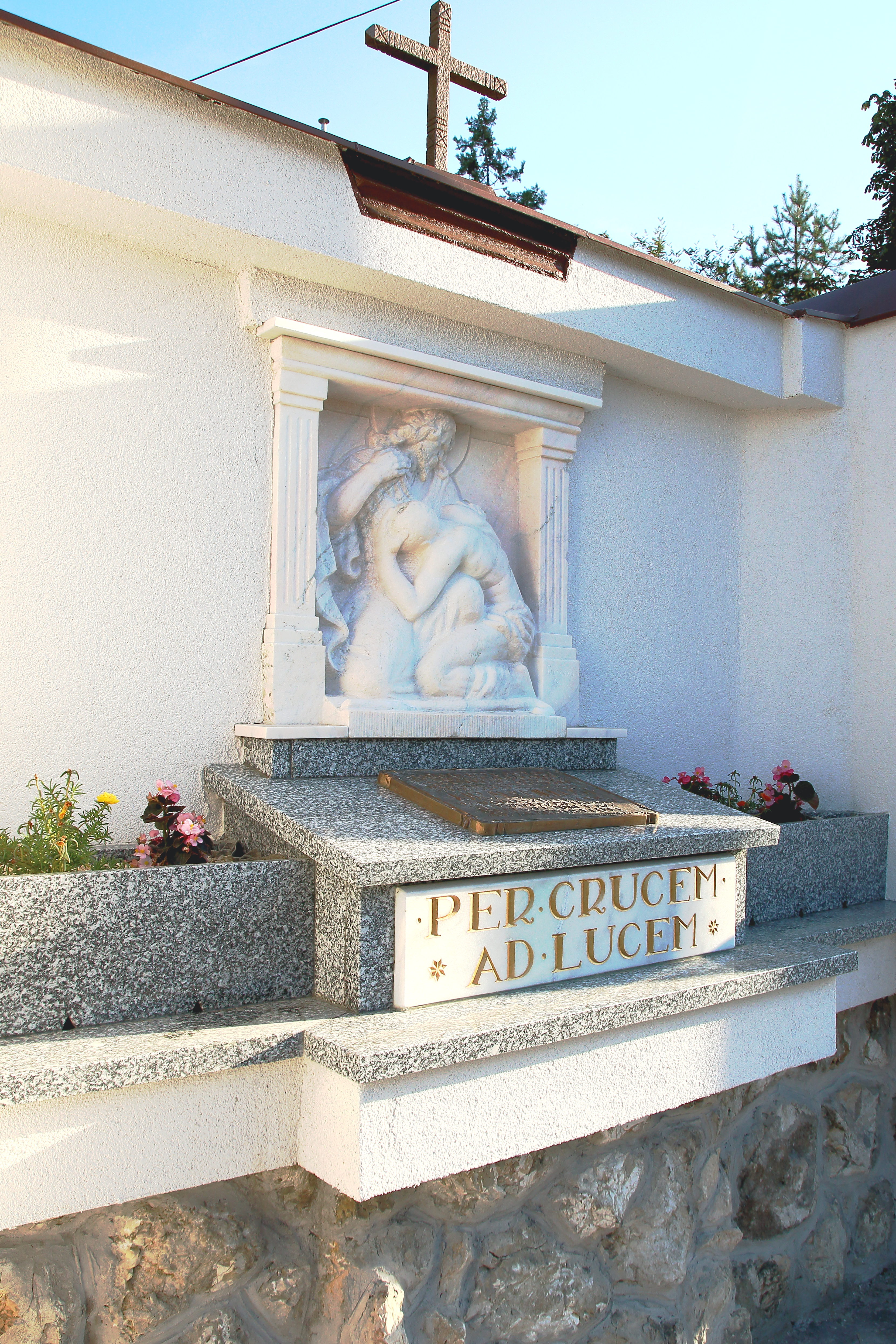 A Király Miklós emlék, 2019-es felújítását követően - „Az emlékmű örök időkön át hirdetni fogja azok dicső emlékét, akik fiatal életükkel pecsételték meg rajongásukat a motorkerékpársport iránt.“ írta a Nemzeti Sport, 1926. augusztus 29-én.Baranyi Károly alkotása